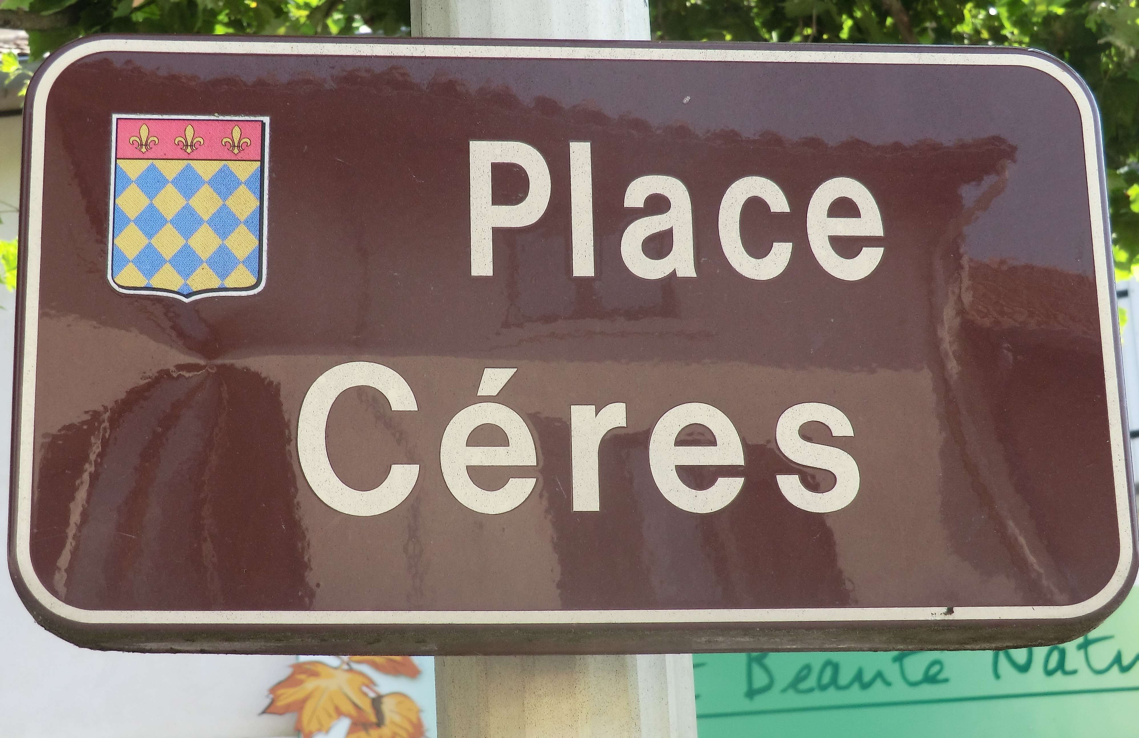 Panneau de la Place Cérès à Villeneuve (Ain).